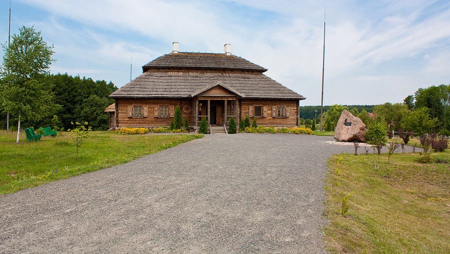 Беларуская (тарашкевіца): Косаўскі палацава-паркавы ансамбль: рэшткі былога палацу Пуслоўскіхмэмарыяльны музэй-сядзіба Т. Касьцюшкіфрагмэнты парку. г. Косава This is a photo of Belarusian heritage monument. Reference number: 111Г000305 ( WLM)